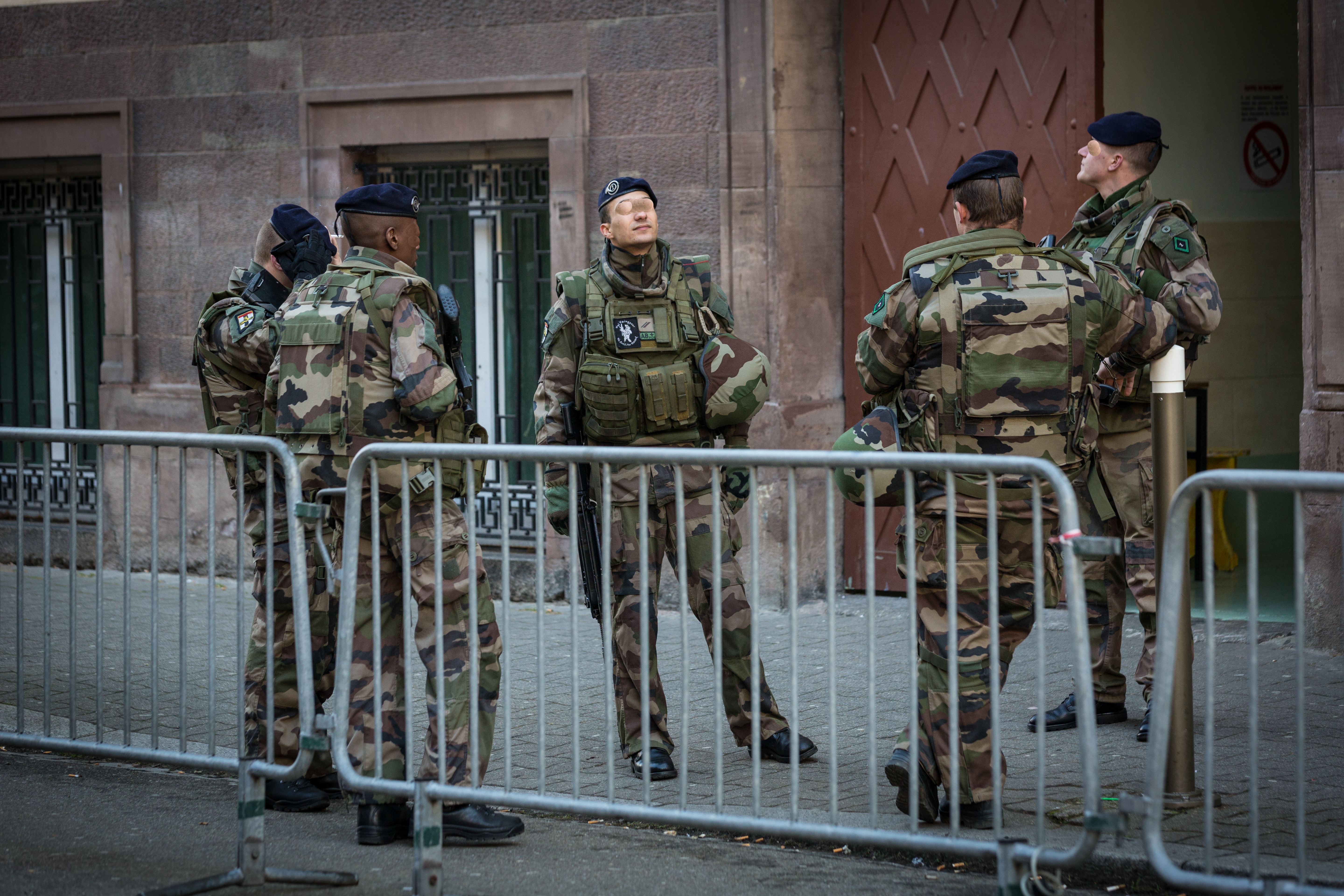 Strasbourg opération Sentinelle février 2015